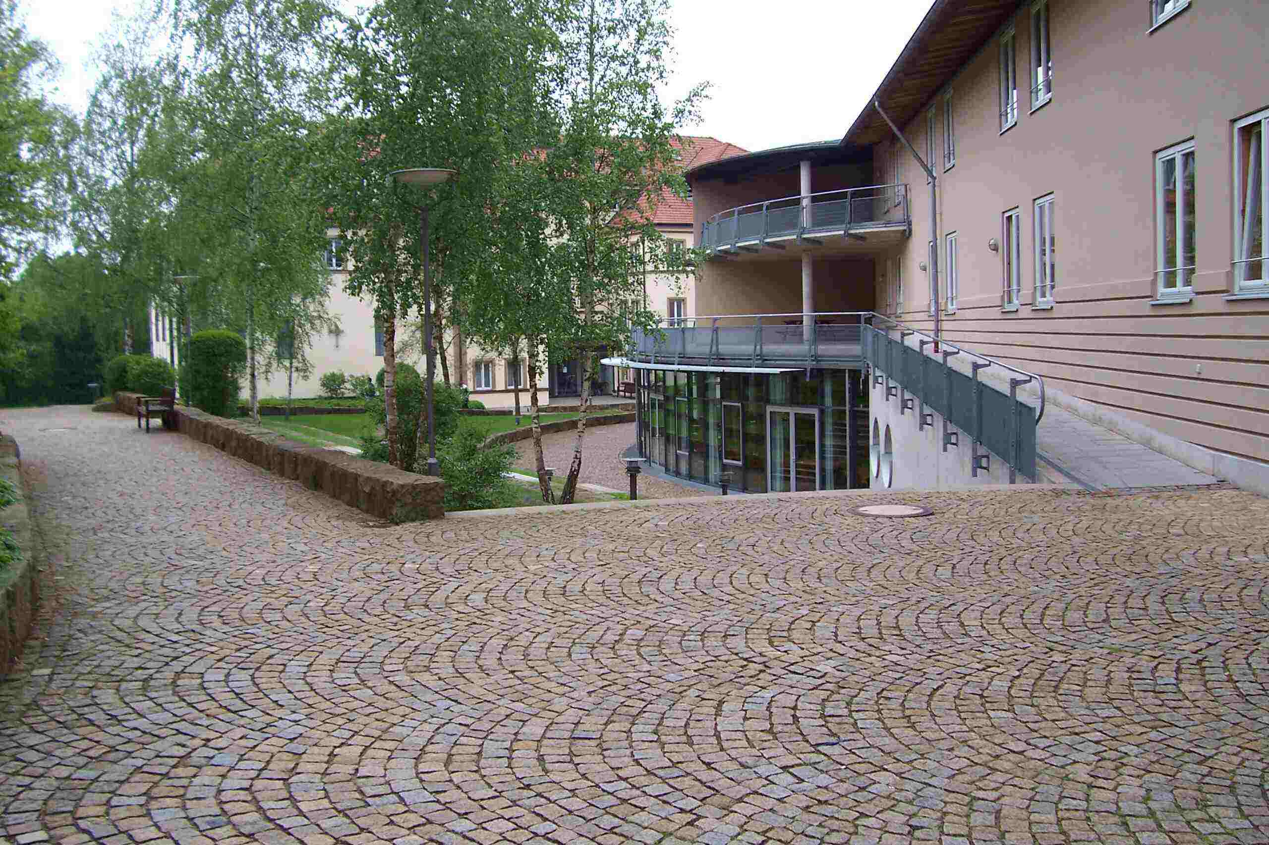 Internat des Windsbacher Knabenchores